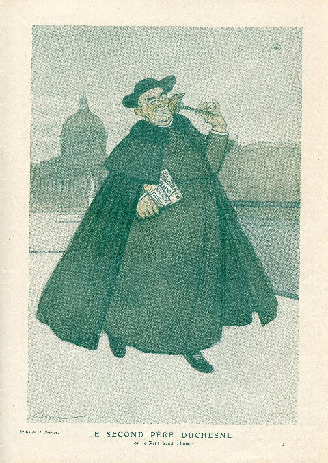 Dessin d'Adrien Barrère, représentant Monseigneur Louis Duchesne (1843-1922), "Le second père Duchesne", dans le magazine Fantasio, 1911.